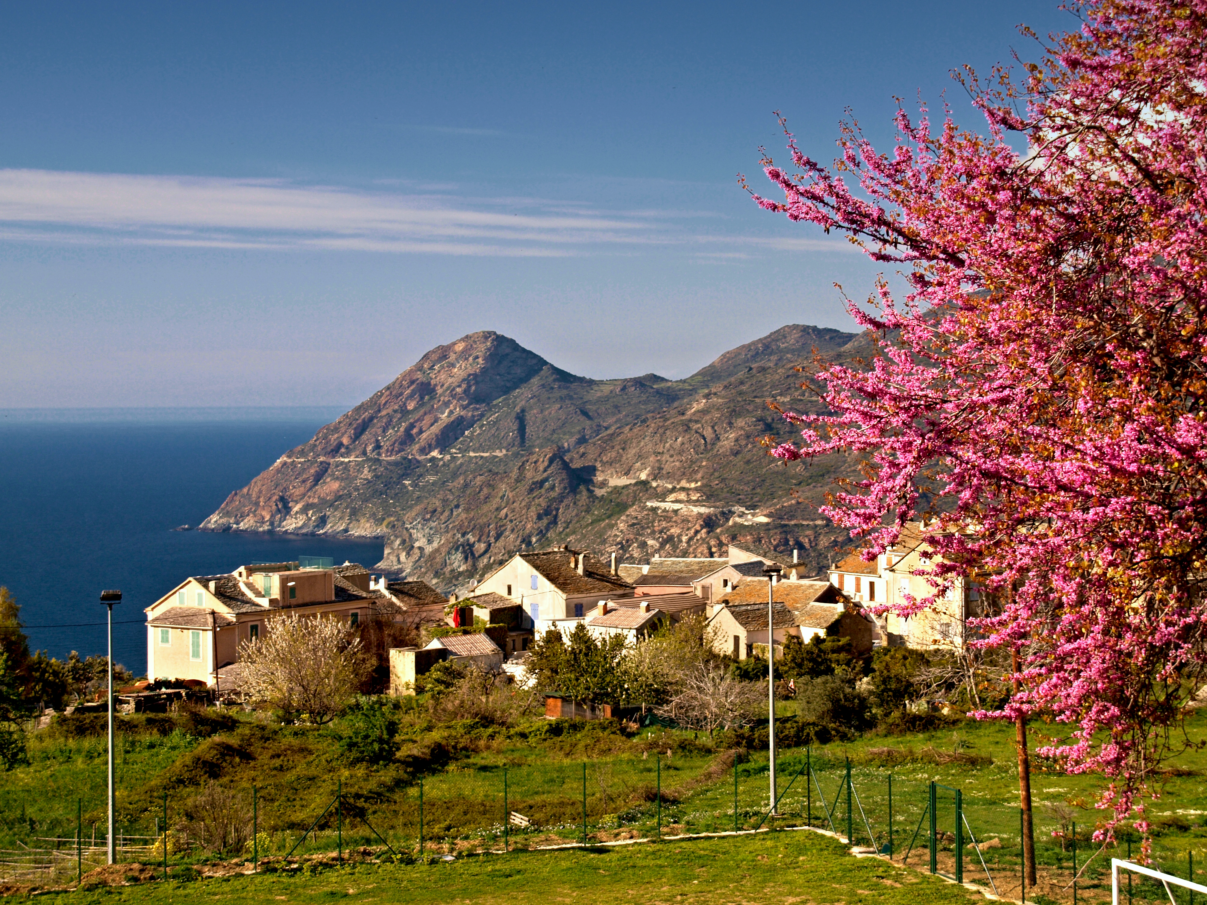 Canari (Corsica) - Hameau de Chine et Monte Minerviu